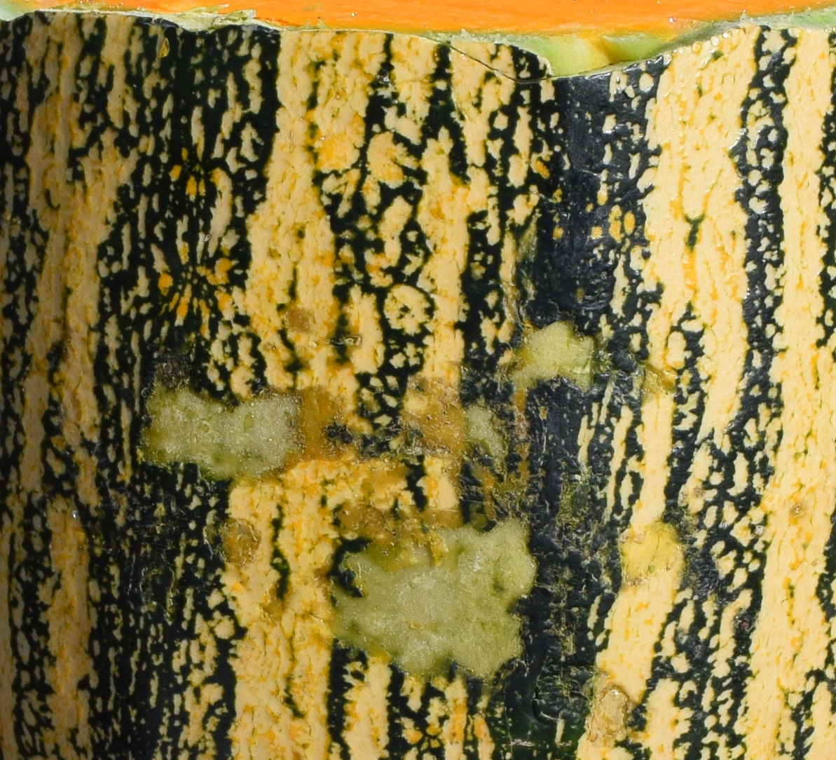 Fortín Olavarría, Buenos Aires province, Argentina.